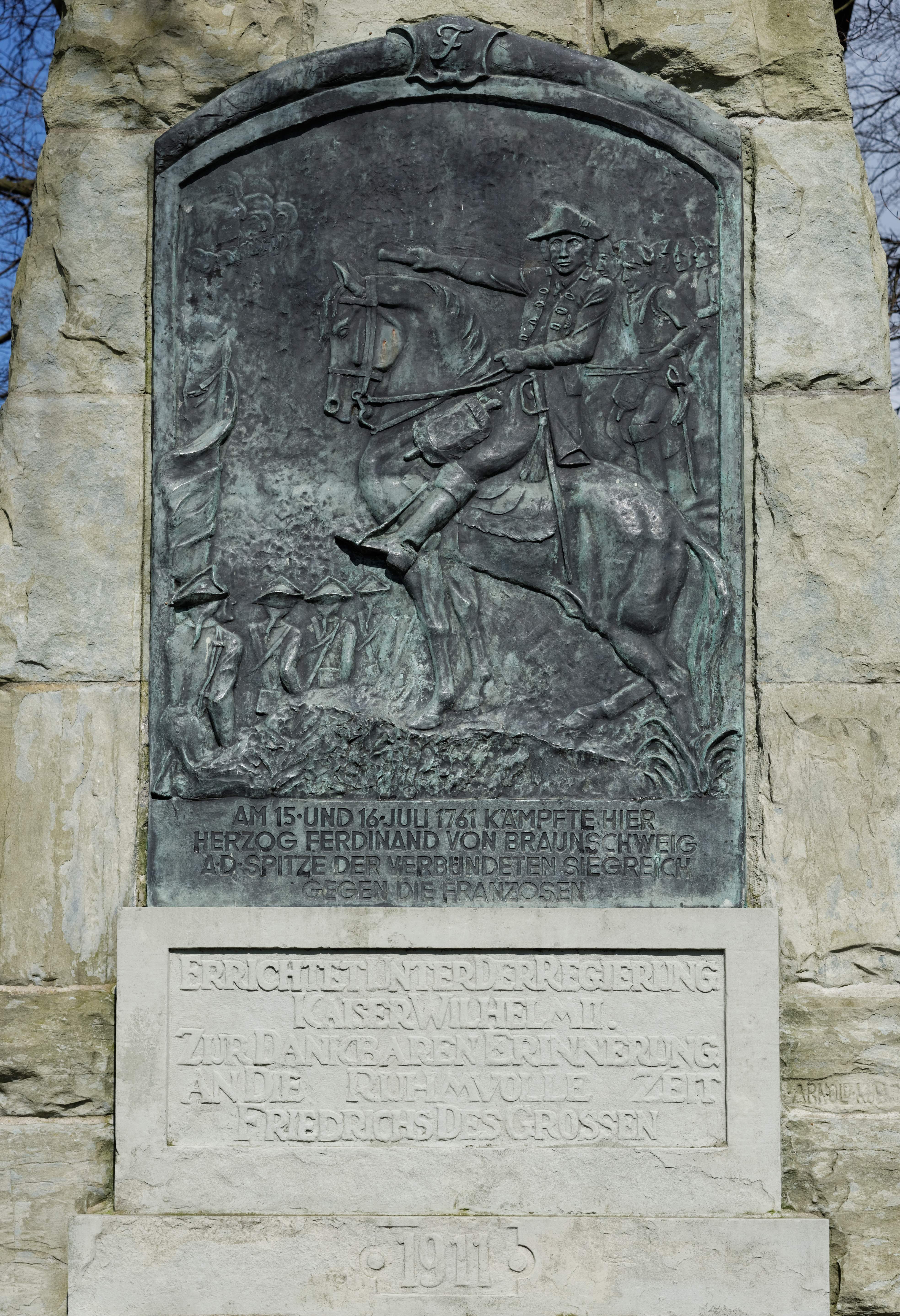 Denkmal zur Erinnerung an die Schlacht bei Vellinghausen This is a photograph of an architectural monument.